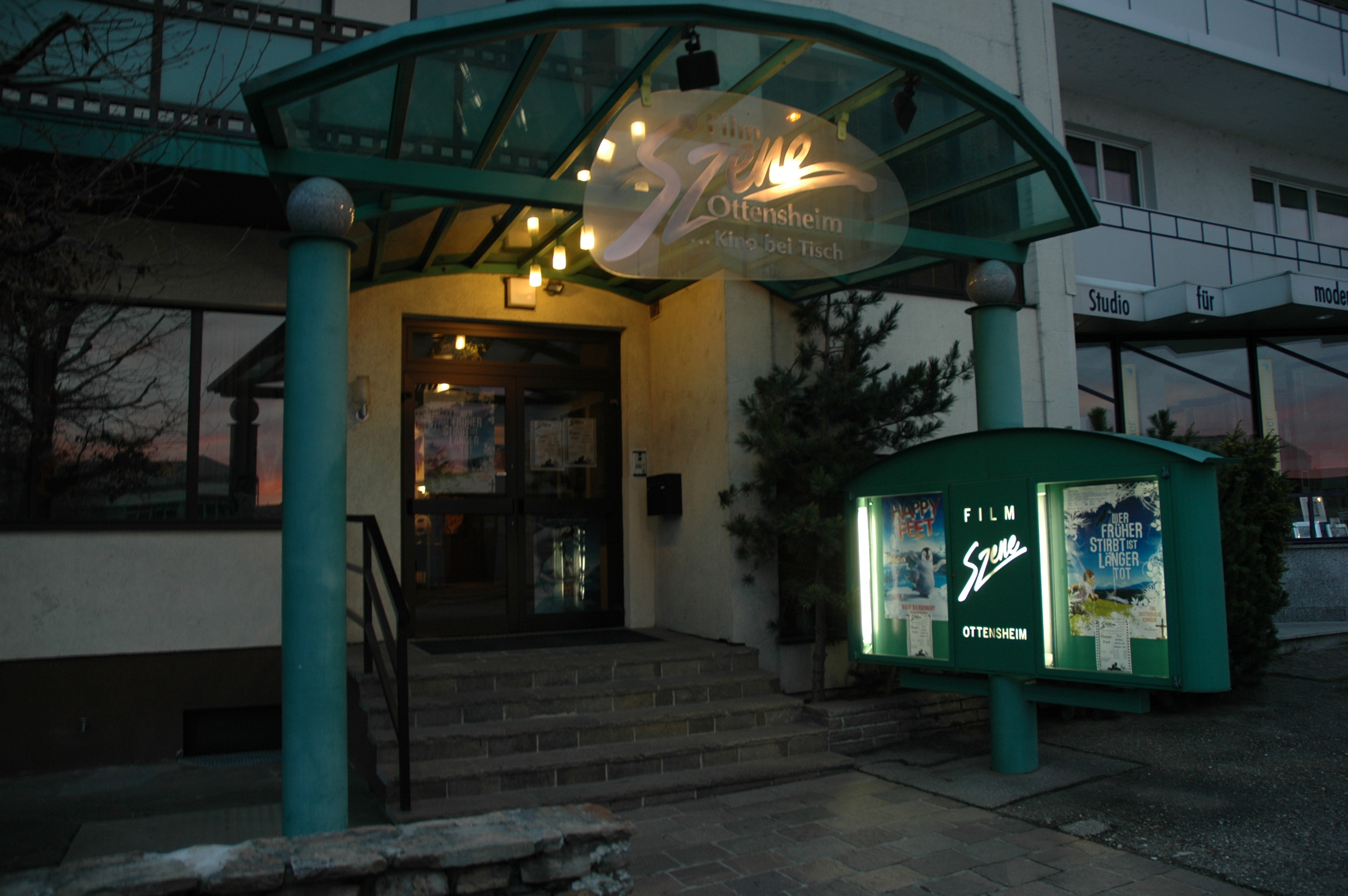 Das Ottensheimer Kino "Filmszene - Kino bei Tisch".